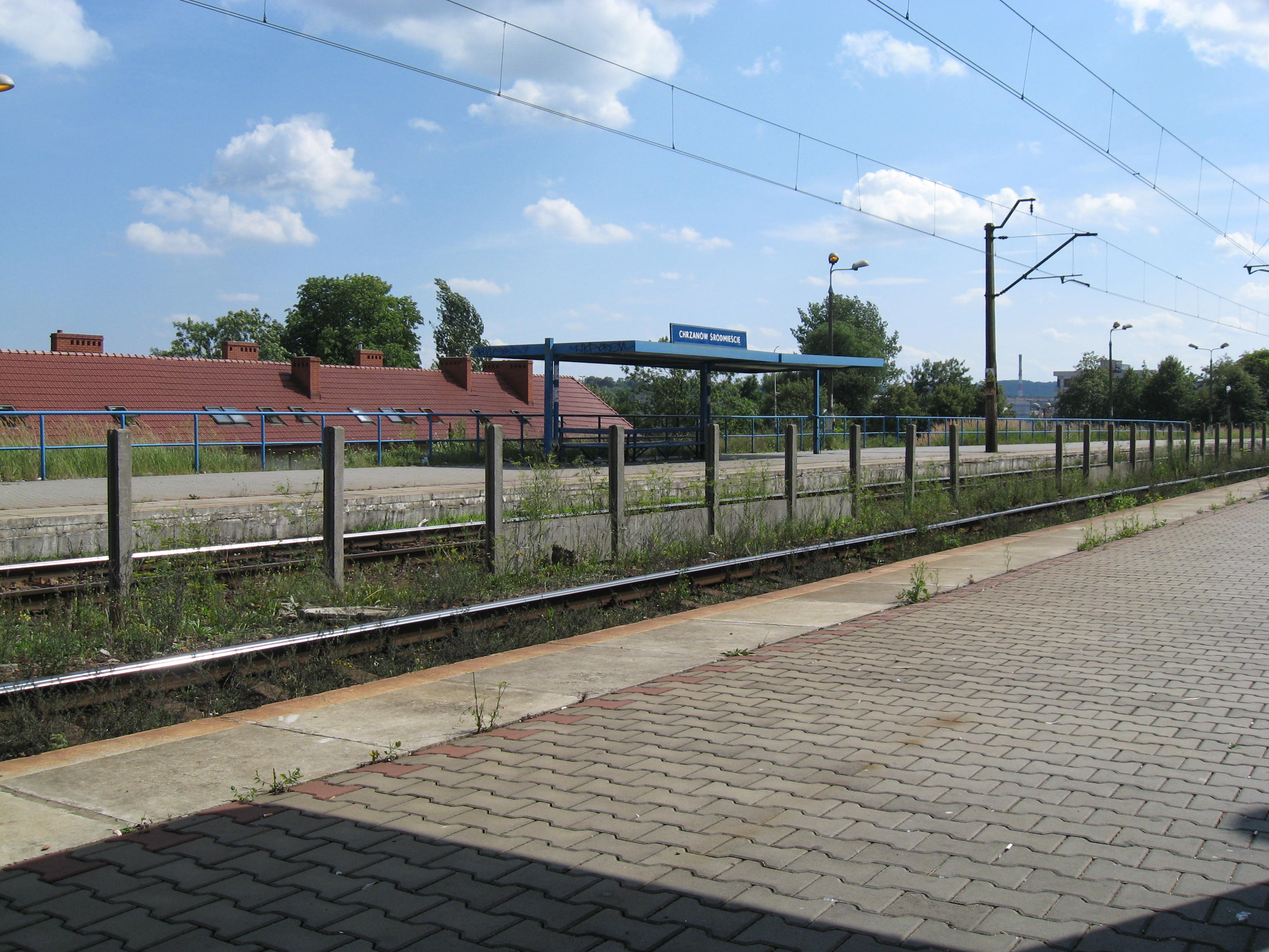 Widok na peron numer 1 dworca Chrzanów Śródmieście